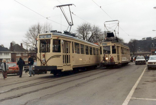 Le dernier tram 92 va quitter Thuin Photo Eric Binamé, en 1983